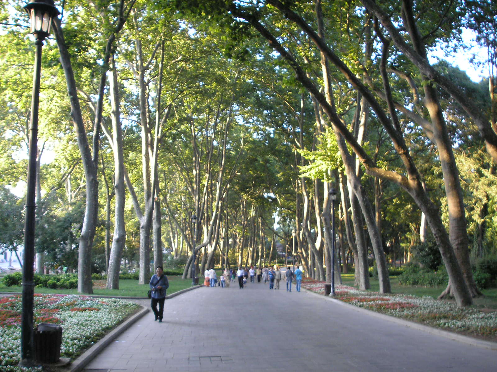 Gülhane Park in Istanbul.